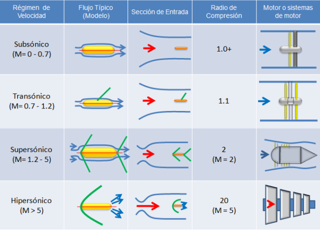 Tipo de túneles aerodinámicos por la velocidad a la que se prueba el modelo.